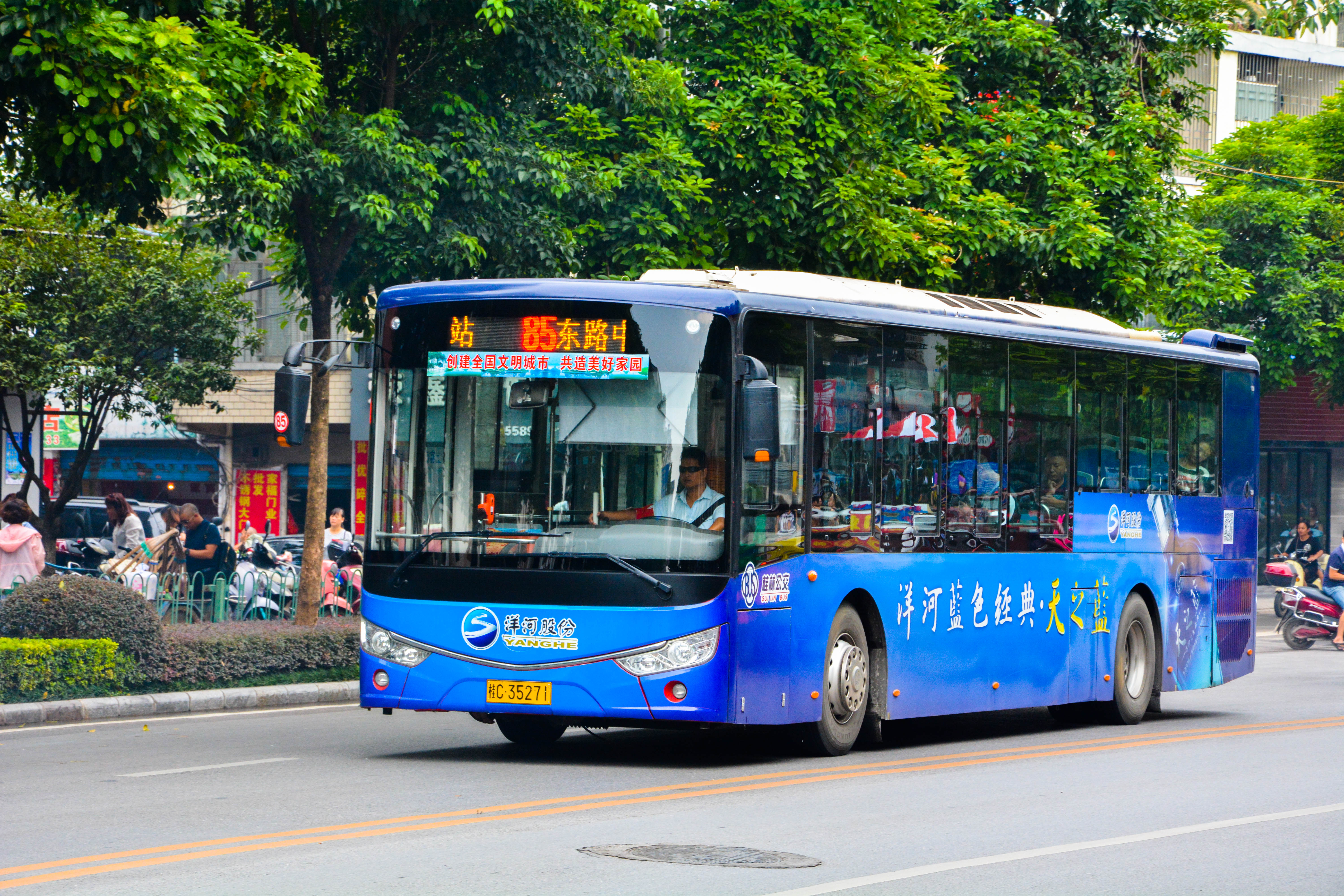 桂林公交混合动力公交车HFF6121G03CHEV-1